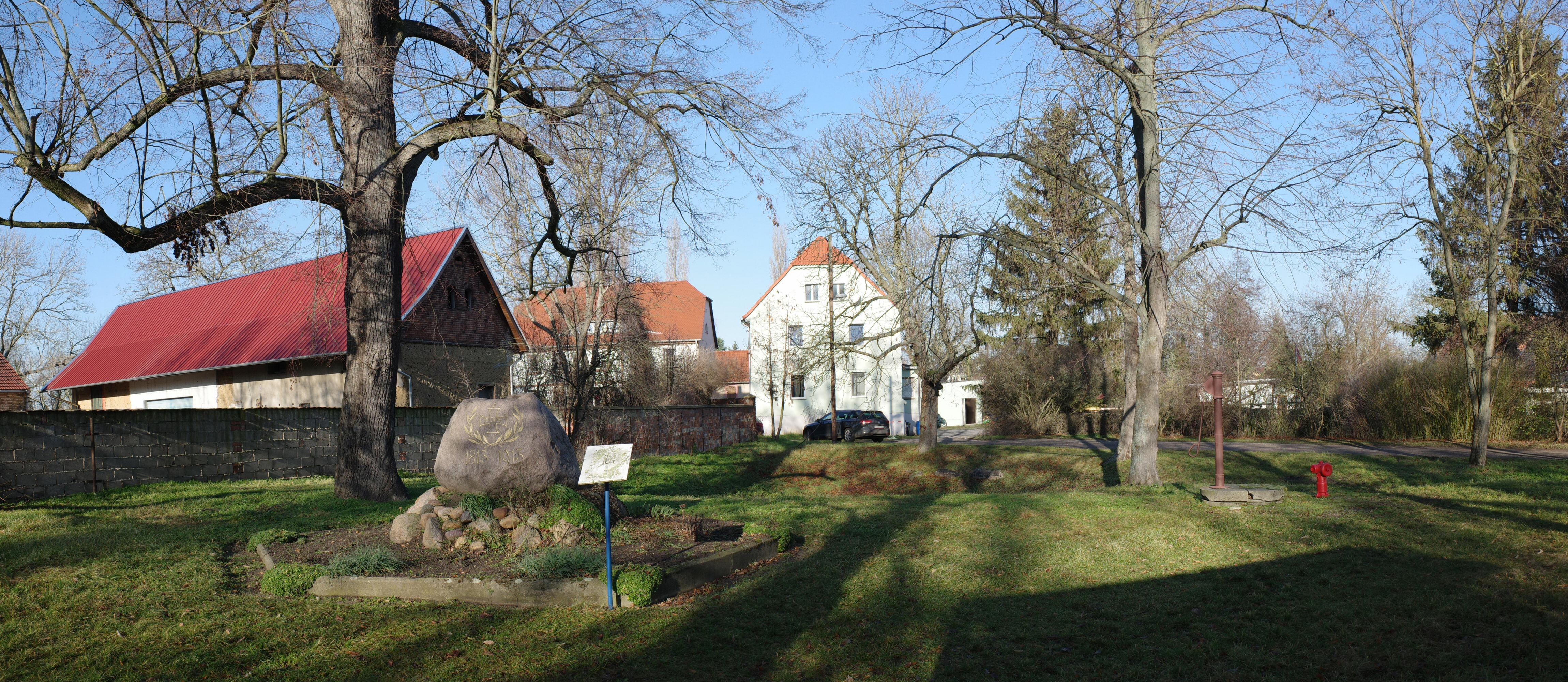 Breesen (Südliches Anhalt), Kriegerdenkmal auf dem Dorfplatz.